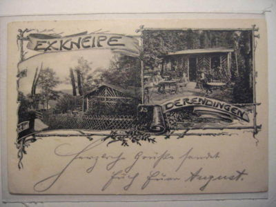 Die Exkneipe Derendingen war eine Hütte der Burschenschaft Derendingia, die diese für Naturkneipen benutzt hat. Die Burschenschaft hatte 1879 ein Rasengrundstück "an der Kreßbacher Höhe", am Waldrand südlich von Derendingen gepachtet, auf dem sie 1886 diesen Pavillon baute